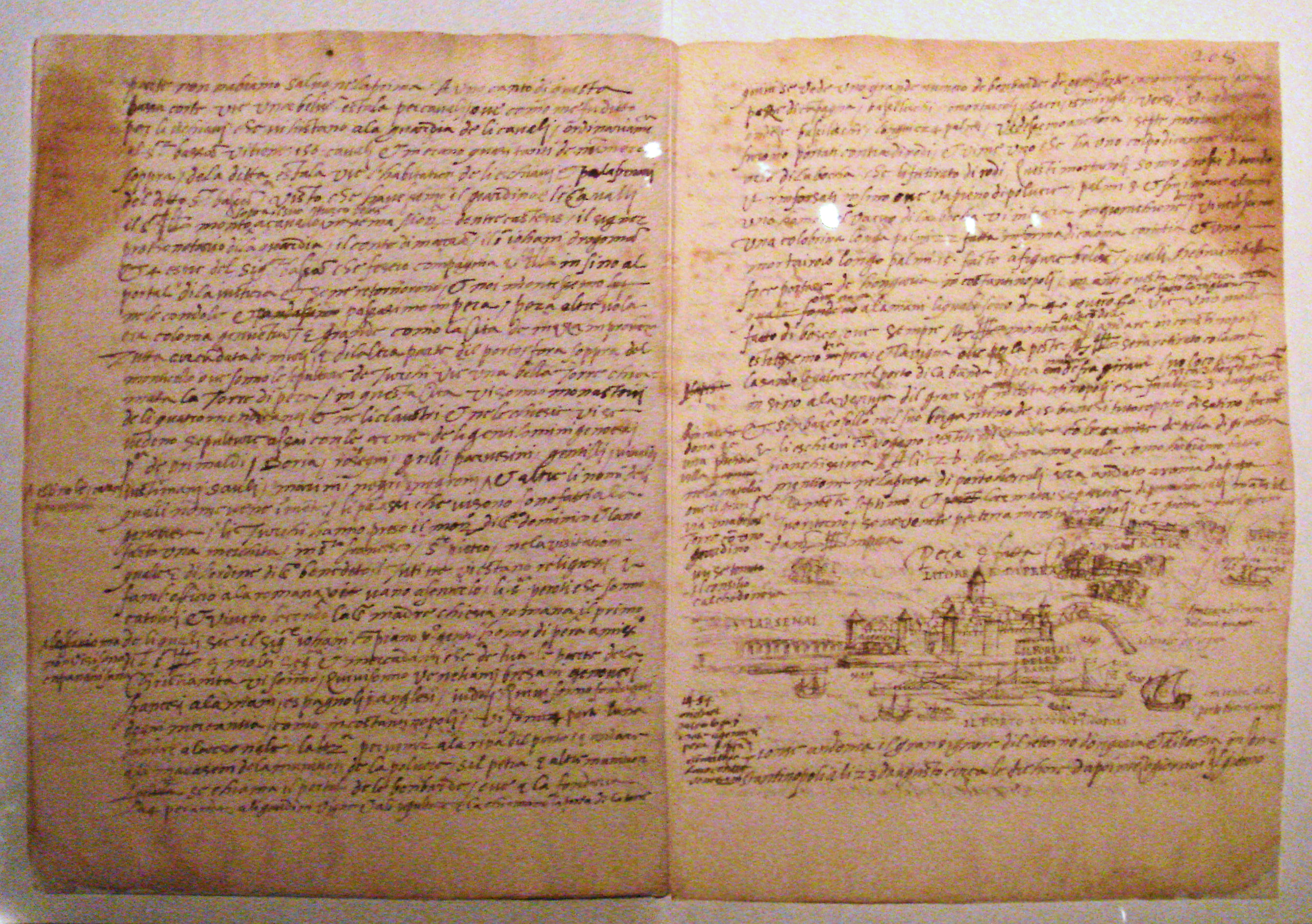 Jérome Maurand Itinéraire d'Antibes à Constantinonple, 1544.